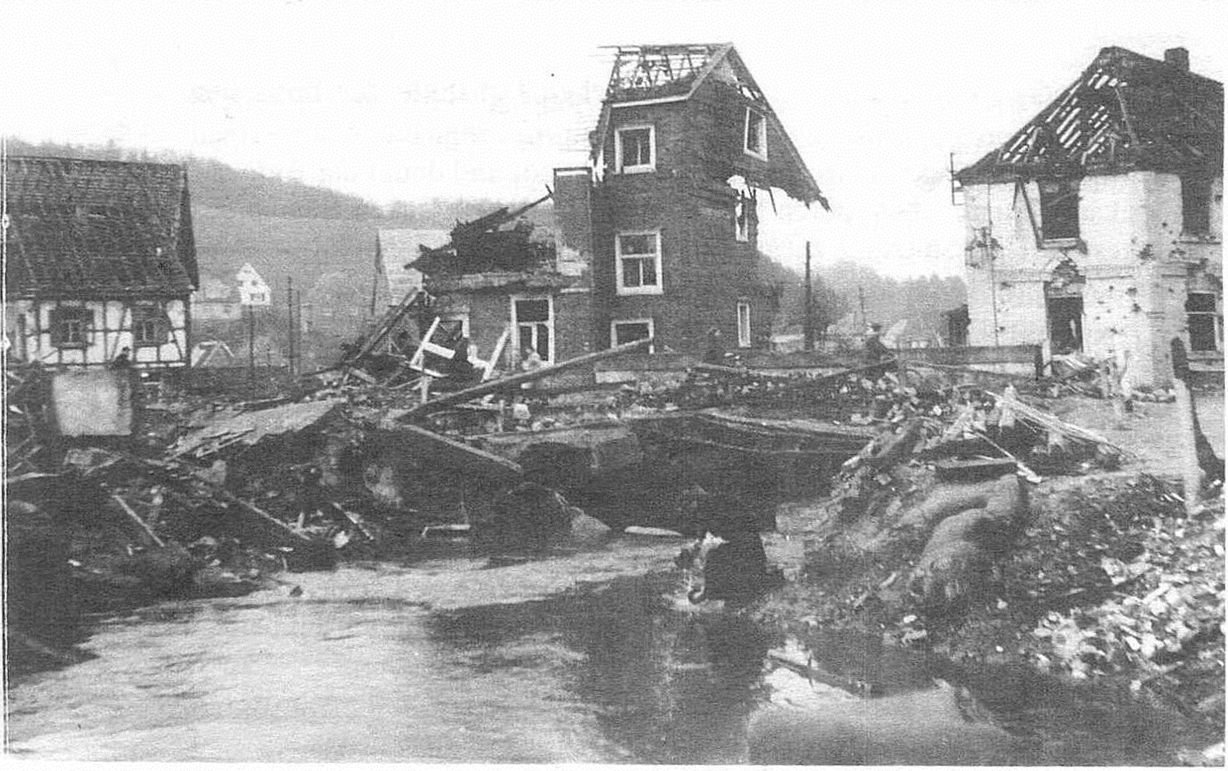 Zerstörte Leppebrücke in Engelskirchen nach Bombardierung März 1945